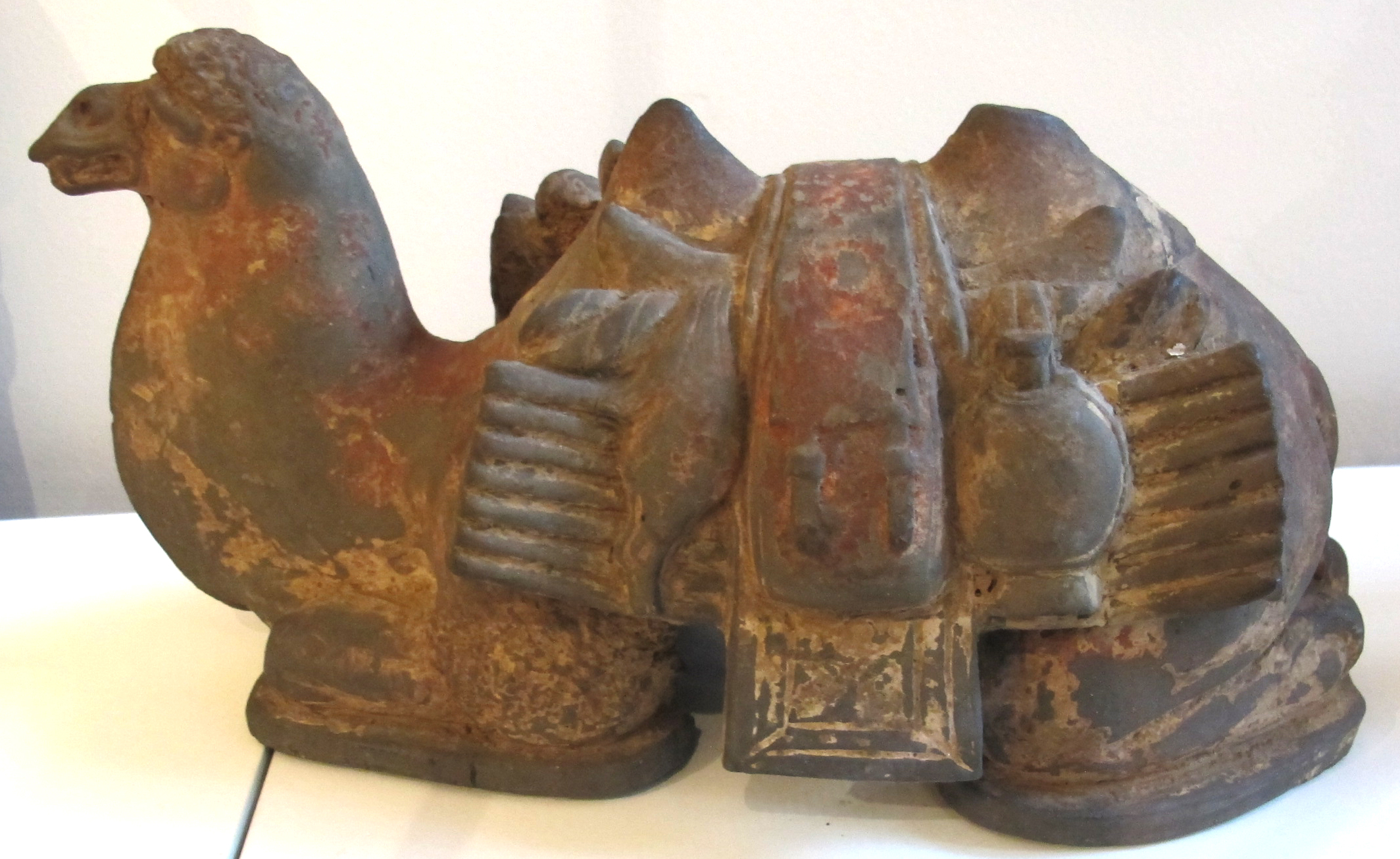 Dinastia wei del nord, cammello a riposo, 500-520 ca.